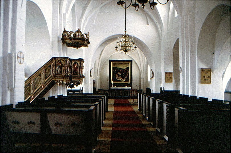 Toreby Kirke i Danmark. Skibet set mod øst